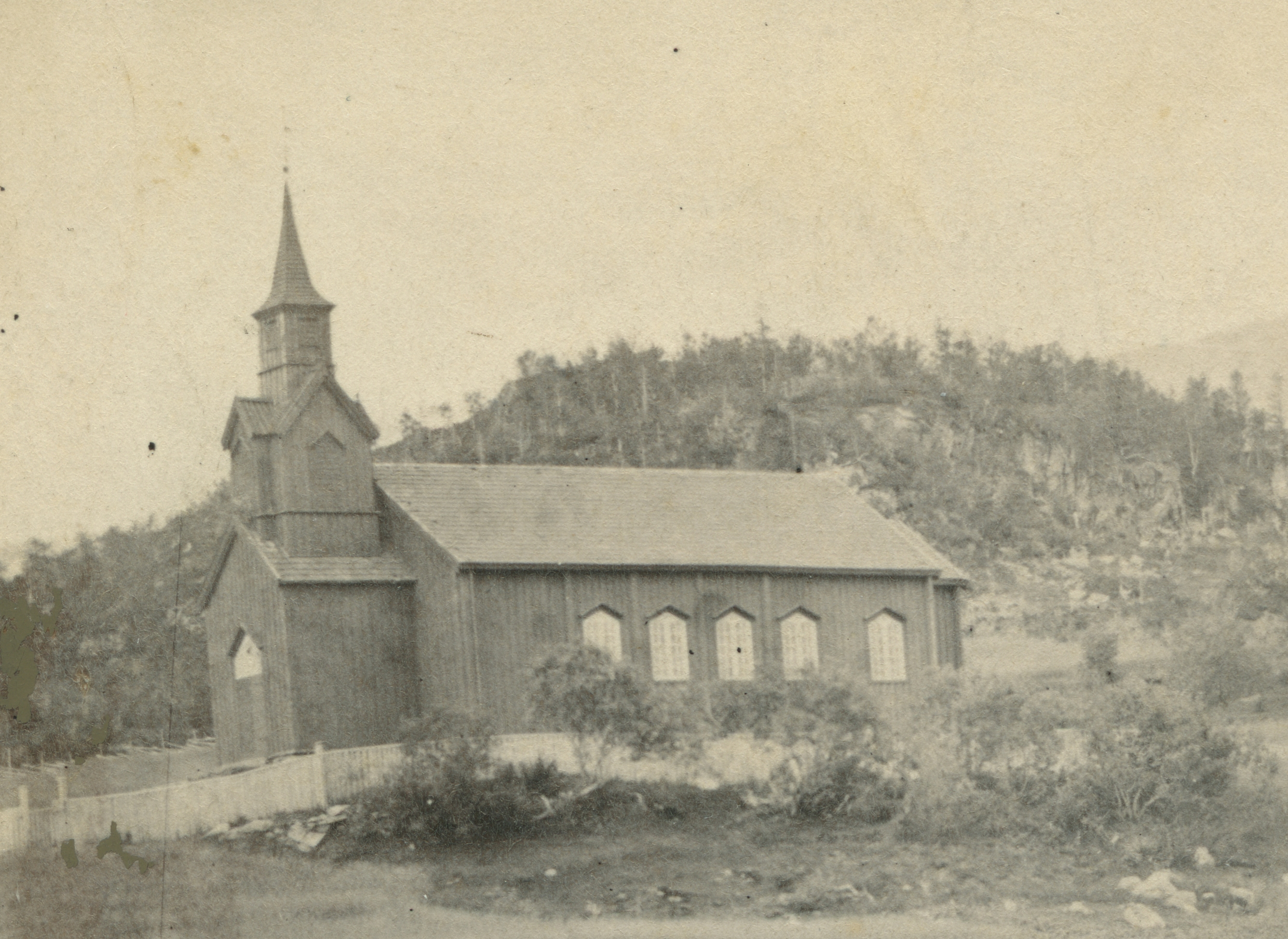 Format: Fotopositiv / Carte de visite Dato / Date: Ukjent, etter 1863 Fotograf / Photographer Ukjent Sted / Place: Foldereid kirke, Nærøy kommune, Nord-Trøndelag Wikipedia: Foldereid kirke Eier / Owner Institution: Trondheim byarkiv, The Municipal Archives of Trondheim Arkivreferanse / Archive reference: Tor.H43.B82.SC026 Merknad: Fra en samling bilder donert Trondheim byarkiv av Sigdis H. H. Charbellet 2017. Bildene har tilhørt Sogneprest i Nærøy fram til 1889 Knud Thorkelsen og hustru Elen Christine Kopsland som bodde på prestegården i Kolvereid.